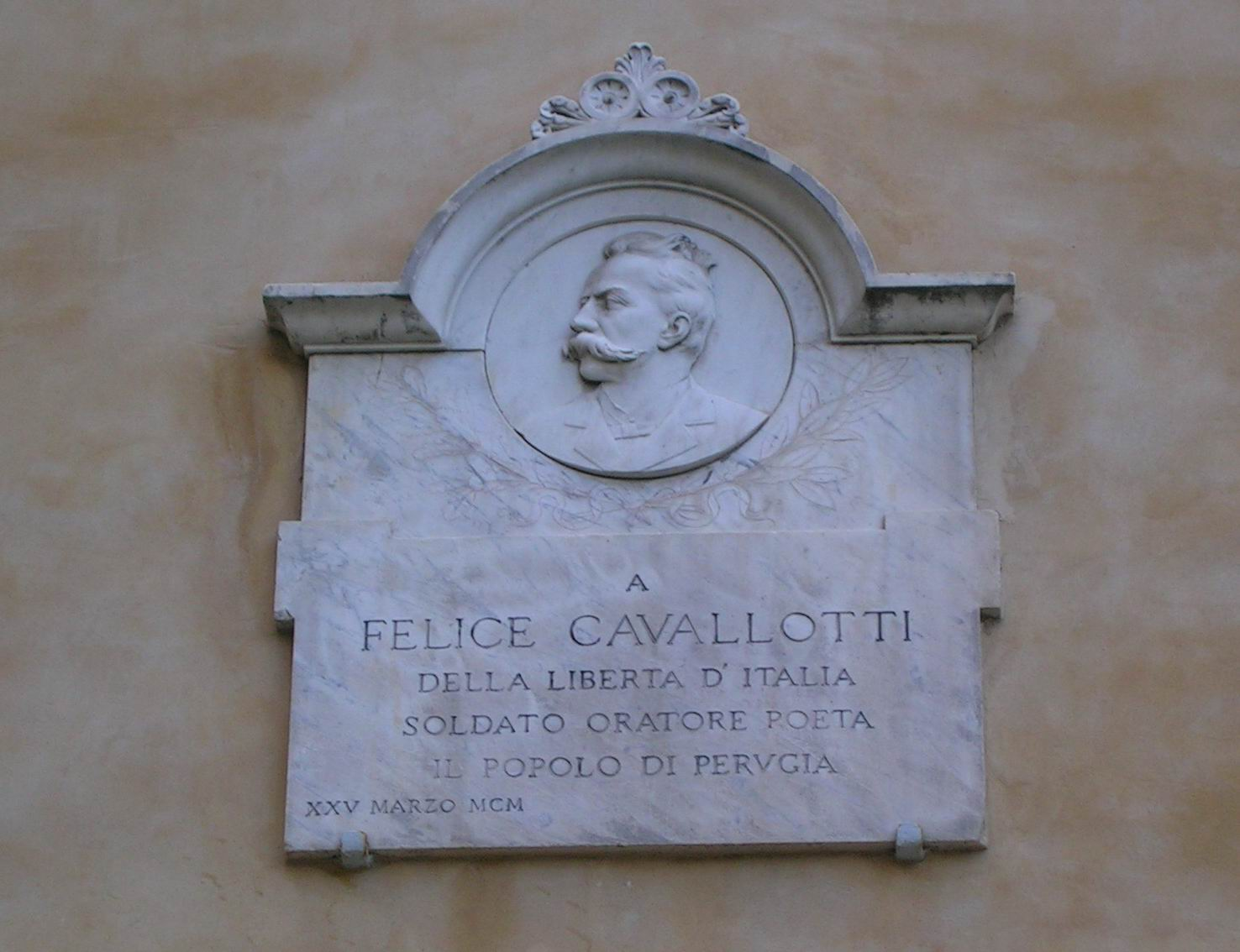 Lapide dedicata a Felice Cavallotti nell'omonima piazza in Perugia